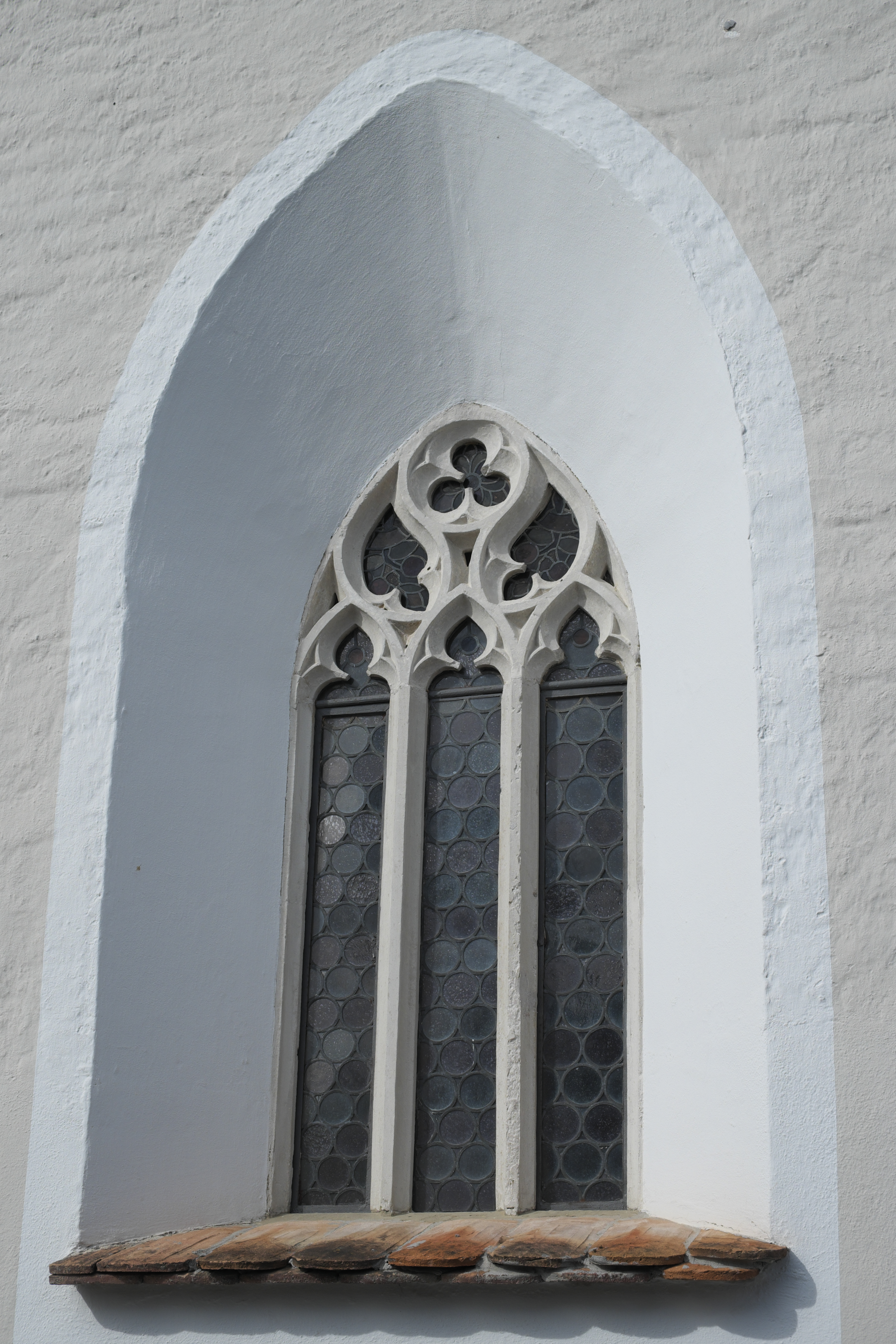 Katholische Friedhofskirche St. Salvator und Sebastian in Weilheim in Oberbayern im Landkreis Weilheim-Schongau (Bayern/Deutschland), Maßwerkfenster im Chor